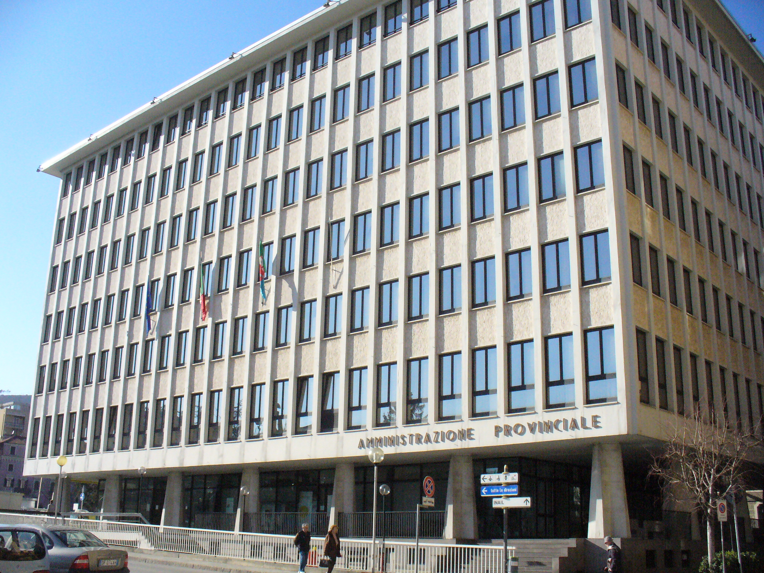 amministrazione provinciale di savona